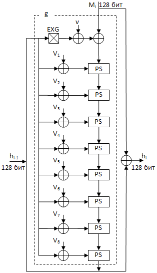 схема поиска функции